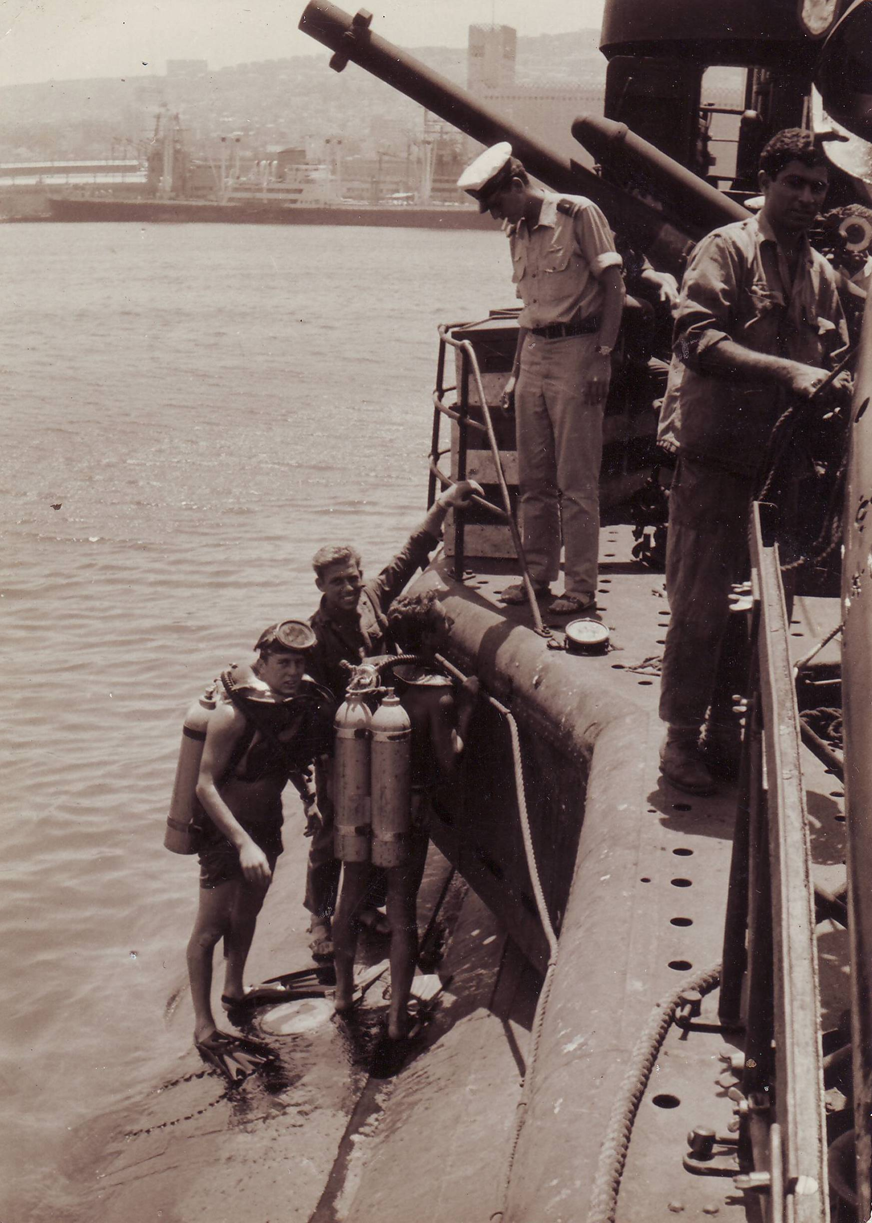 עבודת צוללים על צוללת מסדרה בנמל חיפה